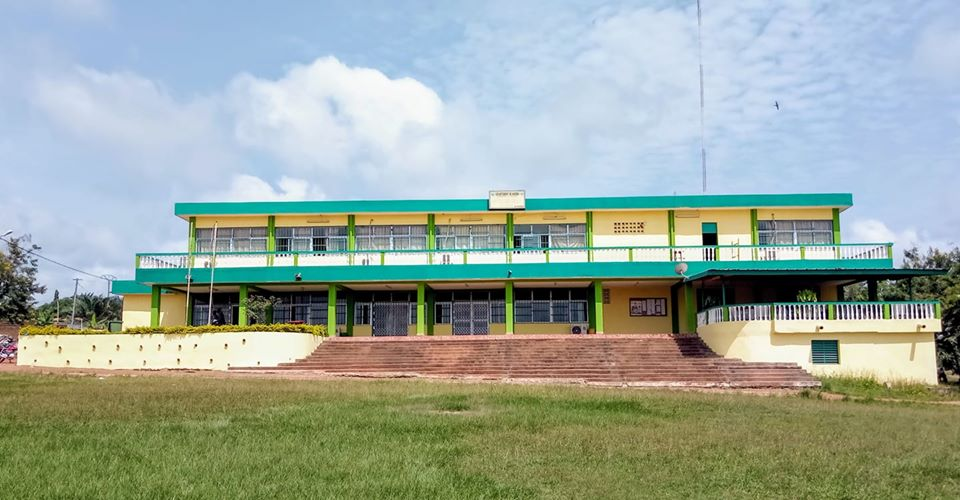 Façade de l’hôtel communal de Sikensi